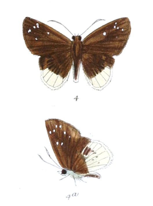 Darpa pteria